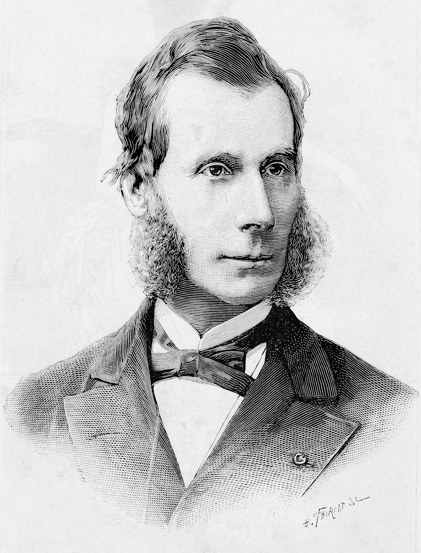 Fustel de Coulanges - Domínio Público